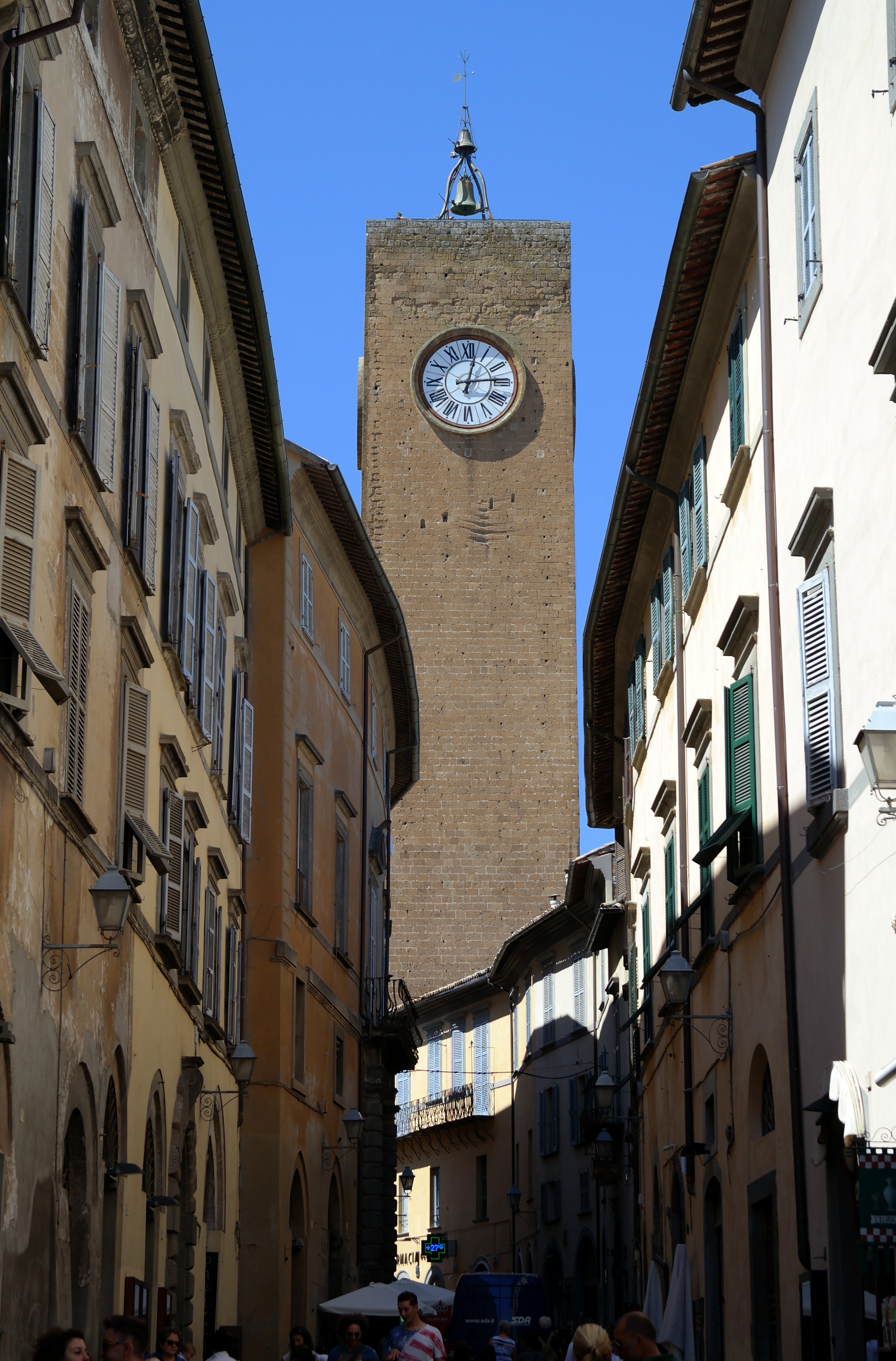 Veduta della Torre del Moro a Orvieto